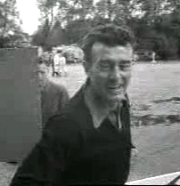 Louison Bobet, Frans wielrenner.